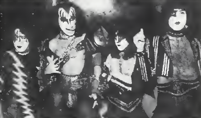 Kiss presentando el álbum Craetures of the Night.